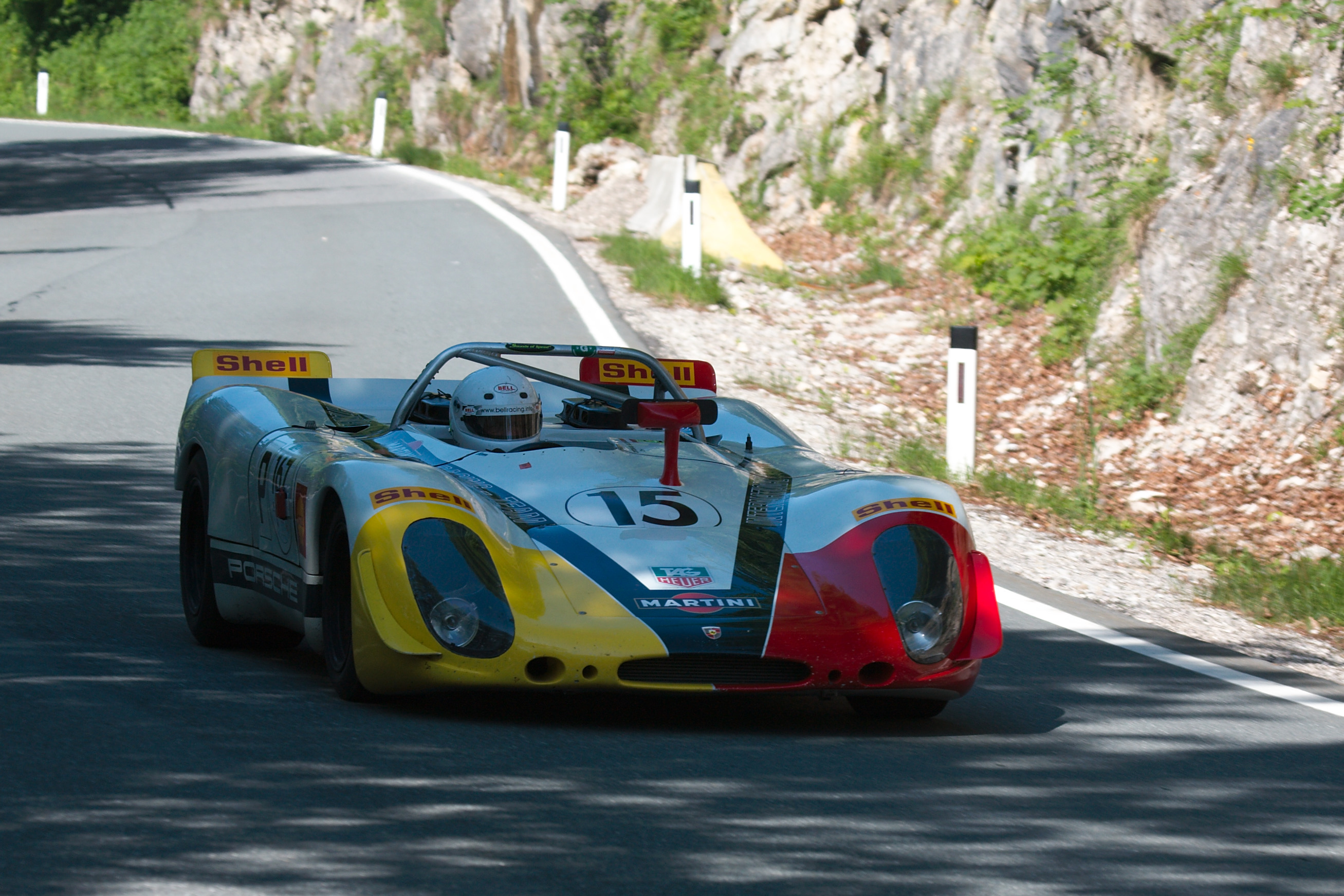 Porsche 908 at Gaisbergrennen 2009